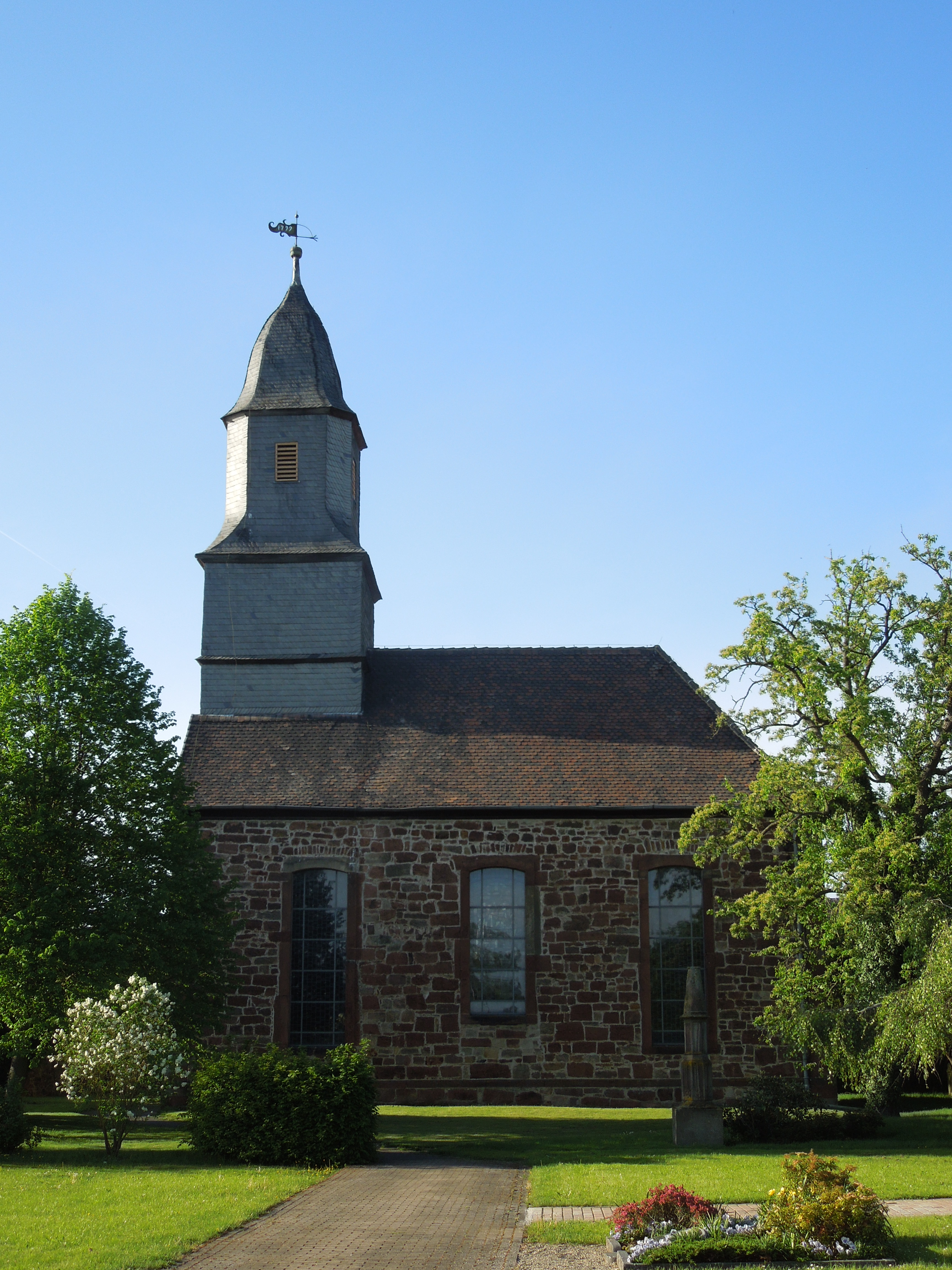 Dorfkirche in Zennern